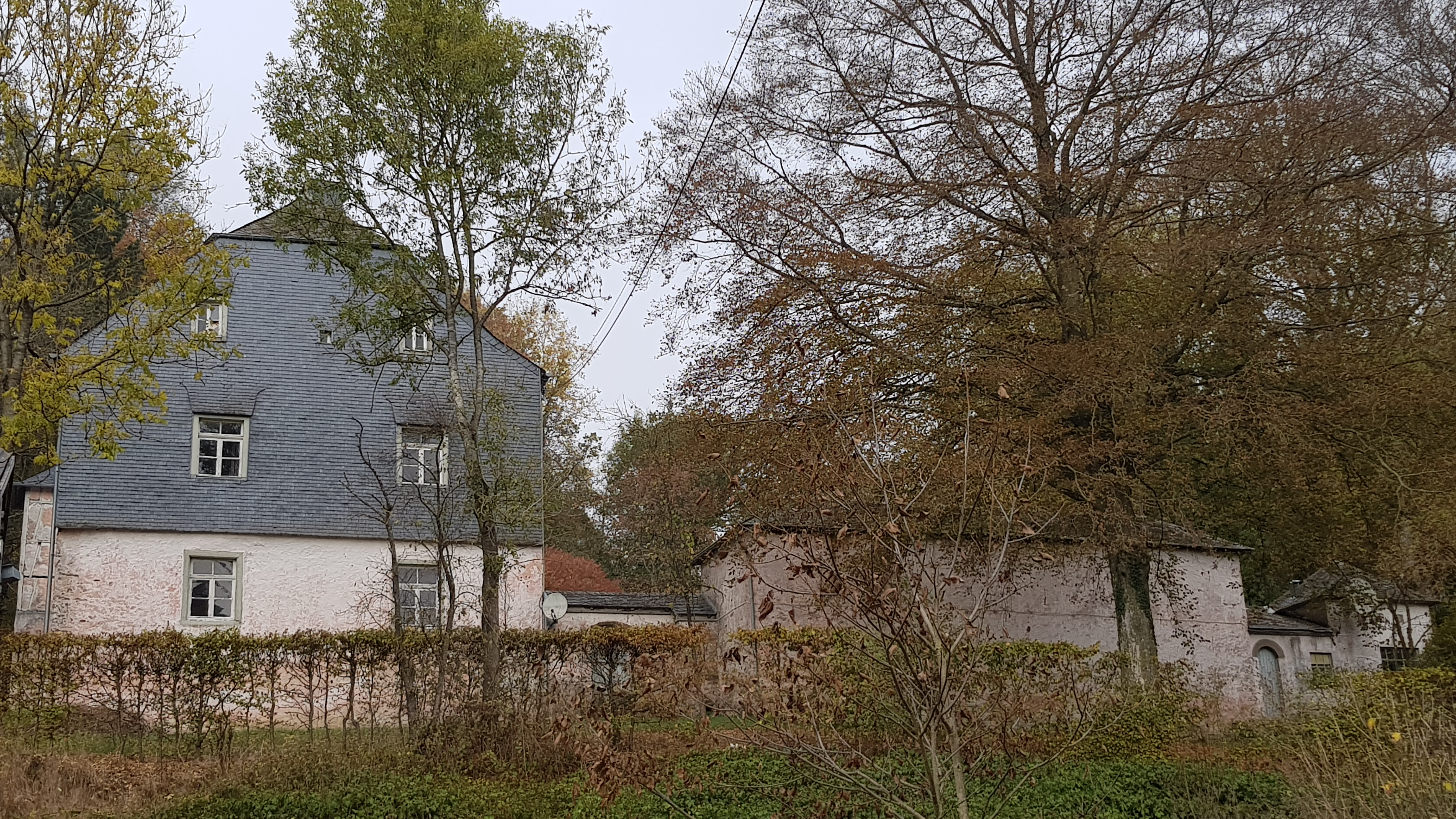 Schloss Oberhausen, Oberhausen, Burg-Reuland, Belgien This photo of immovable heritage has been taken in the Walloon Region